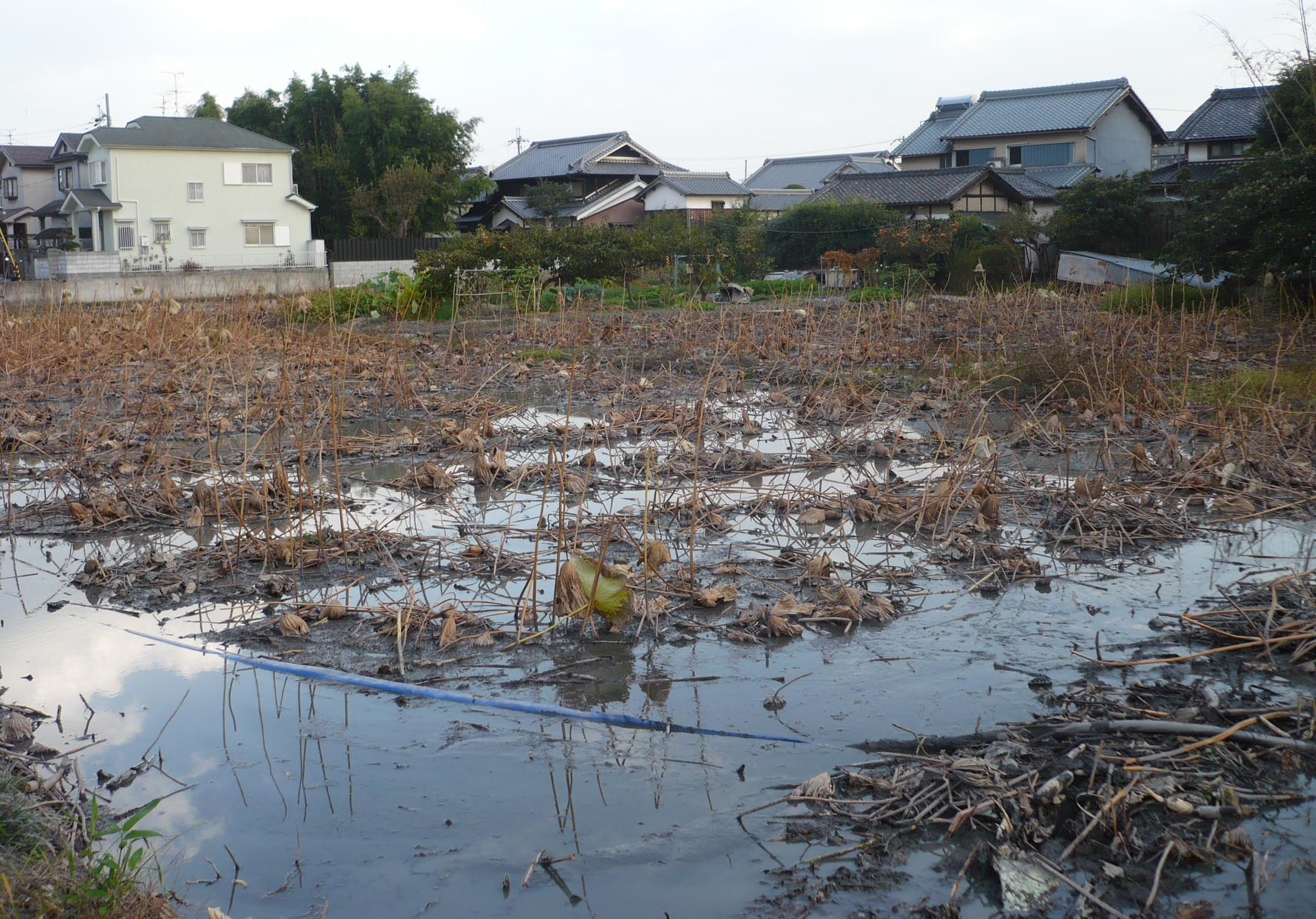 蓮根畑